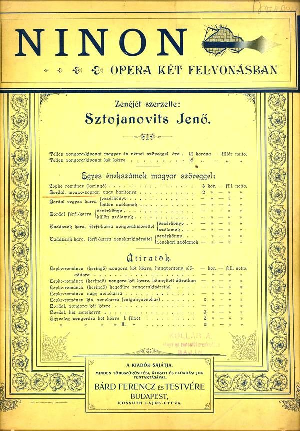 Sztojanovits Jenő: Ninon. Kiadó: Bárd Ferencz és Testvére, Budapest.